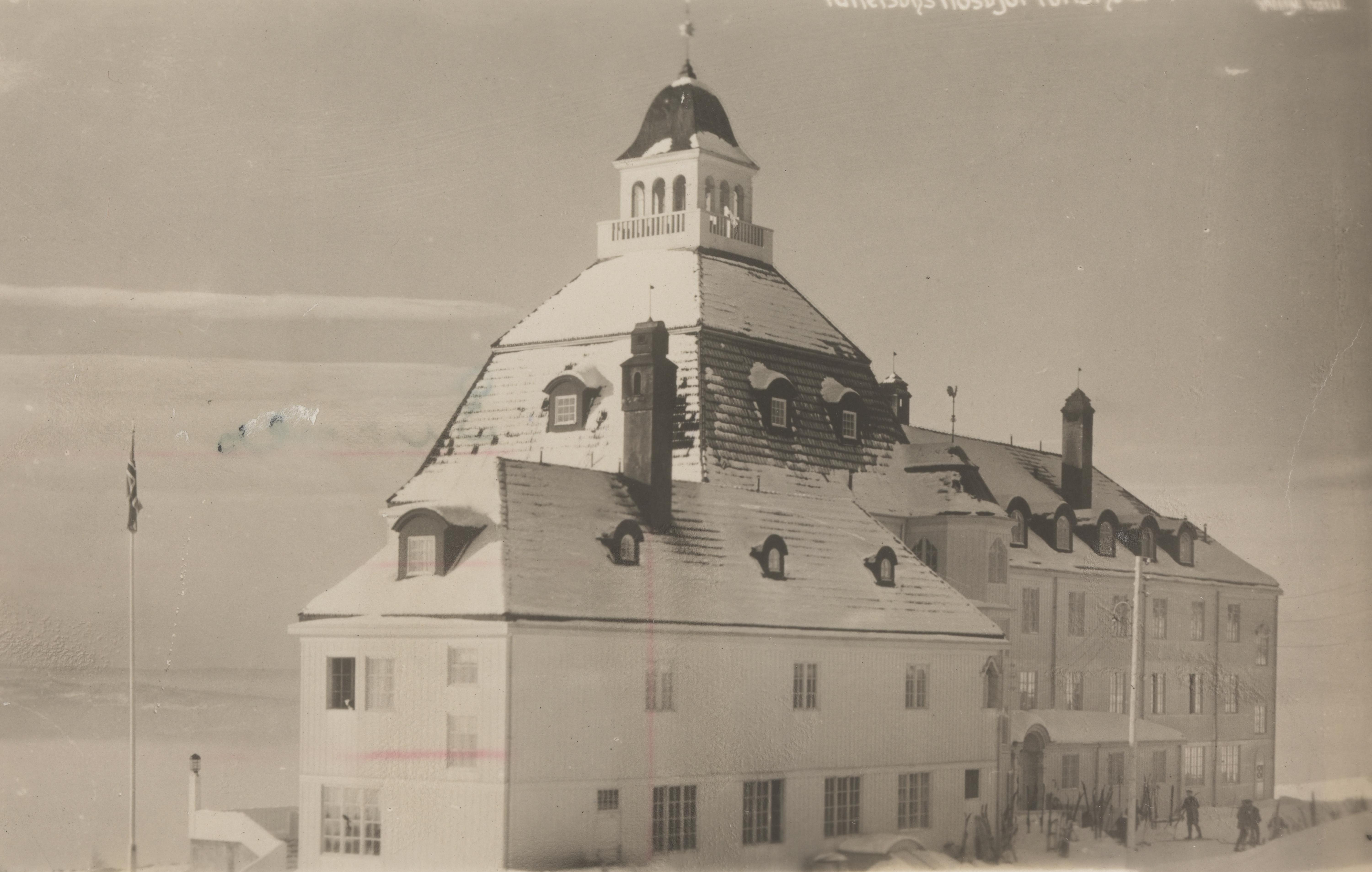 Bildet er hentet fra Nasjonalbibliotekets bildesamling Brumundal,Høsbjør, Ringsaker, Hedmark